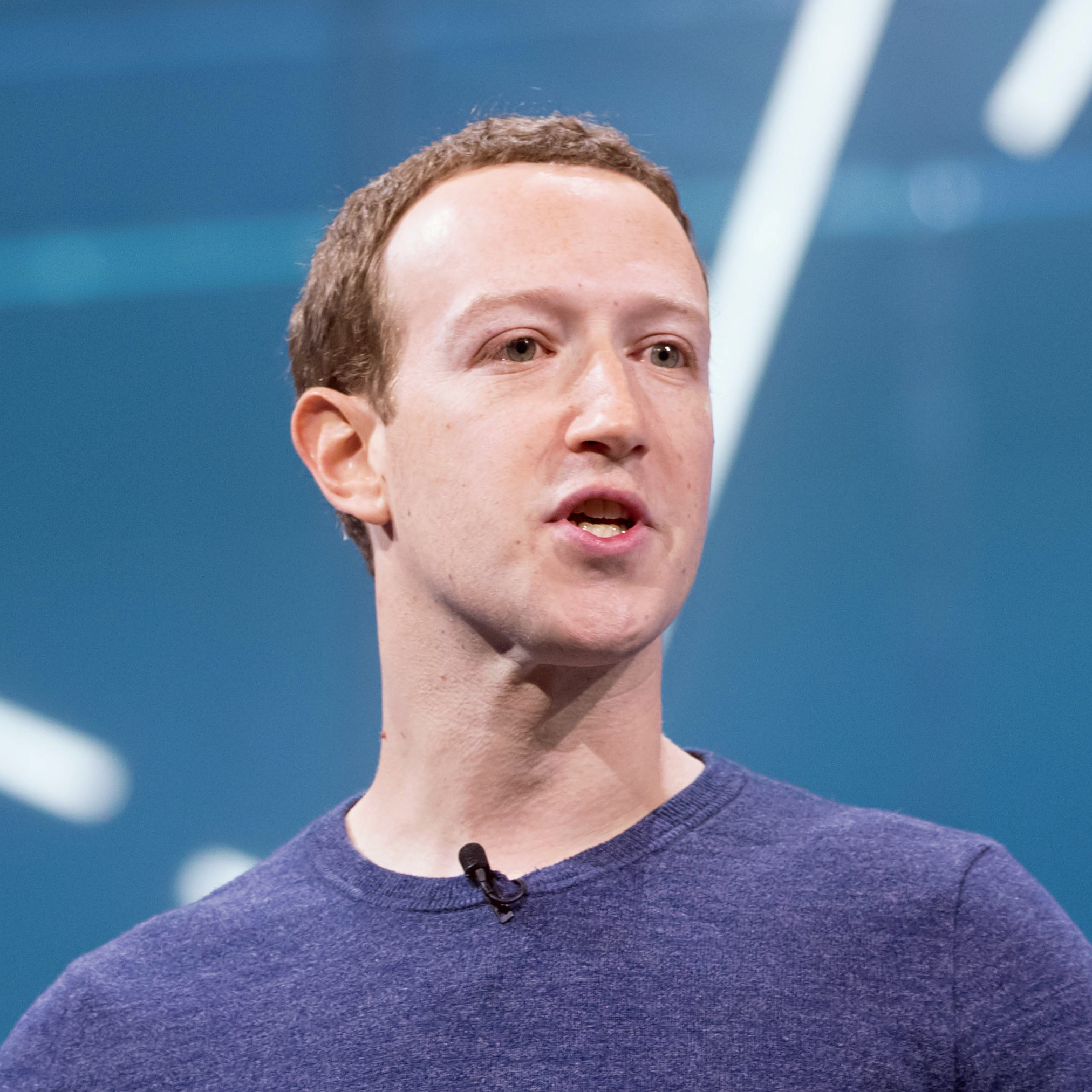 Mark Zuckerberg F8 2018 Keynote